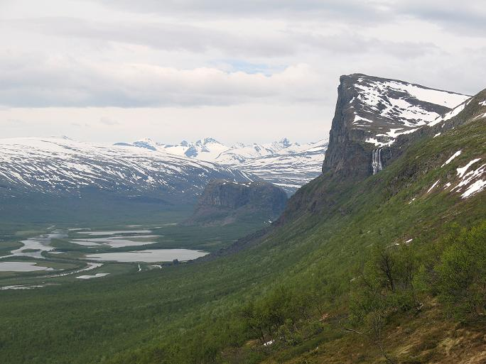 Skierfe i Rapadalen